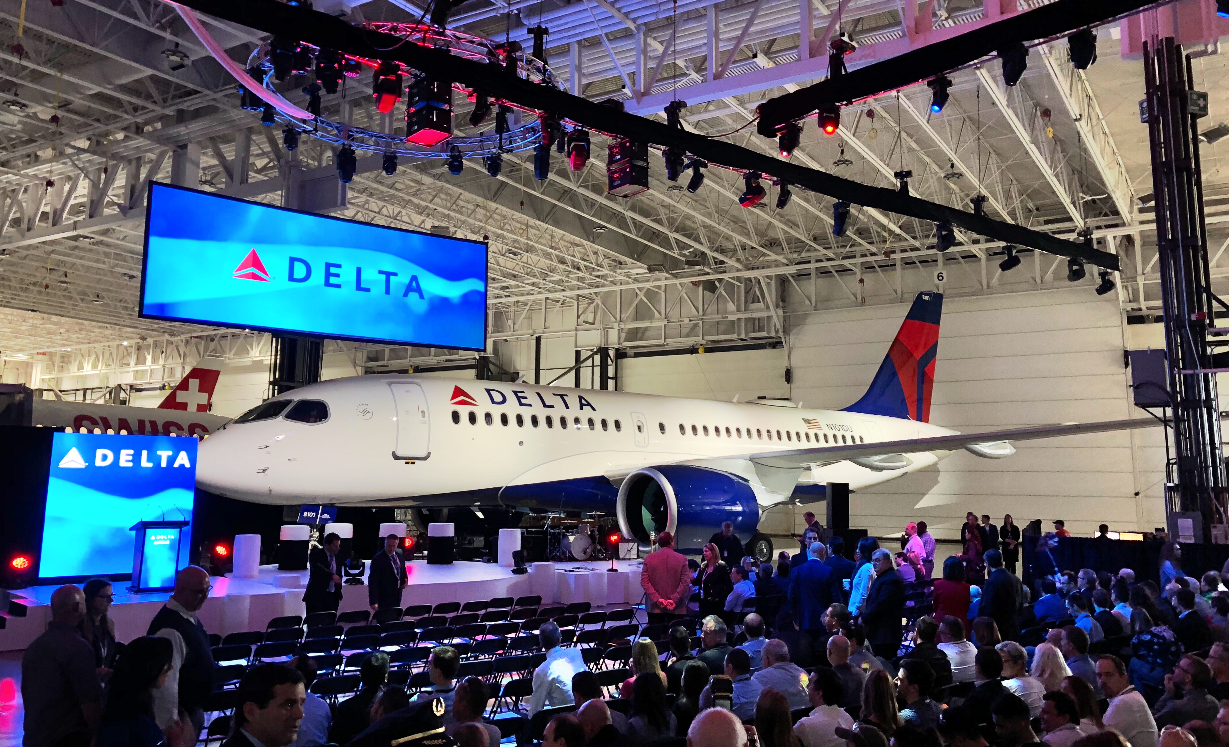 First Delta A220 delivery